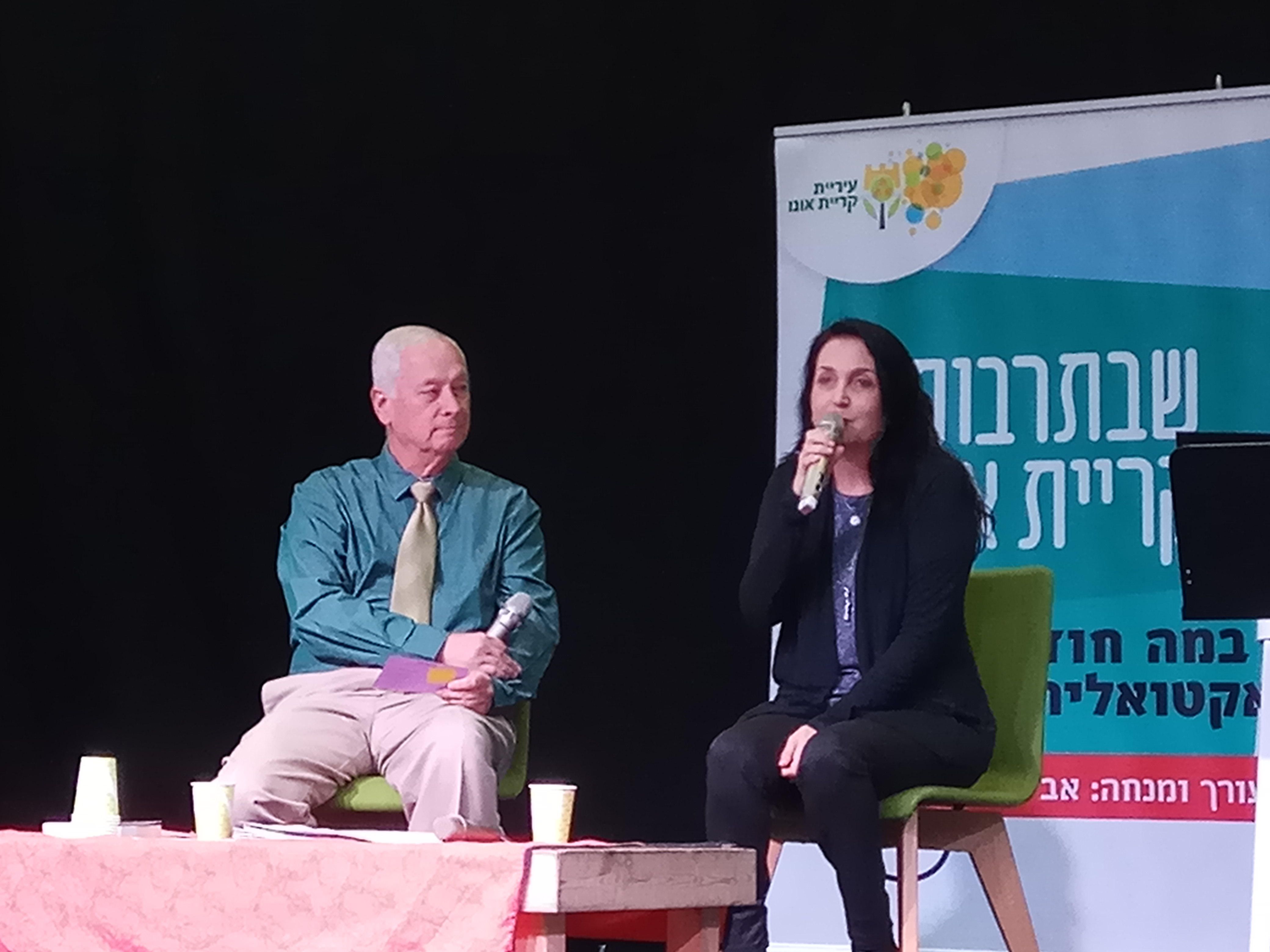 חני דינור באירוע שבתרבות בקריית אונו עם אבי בטלהיים